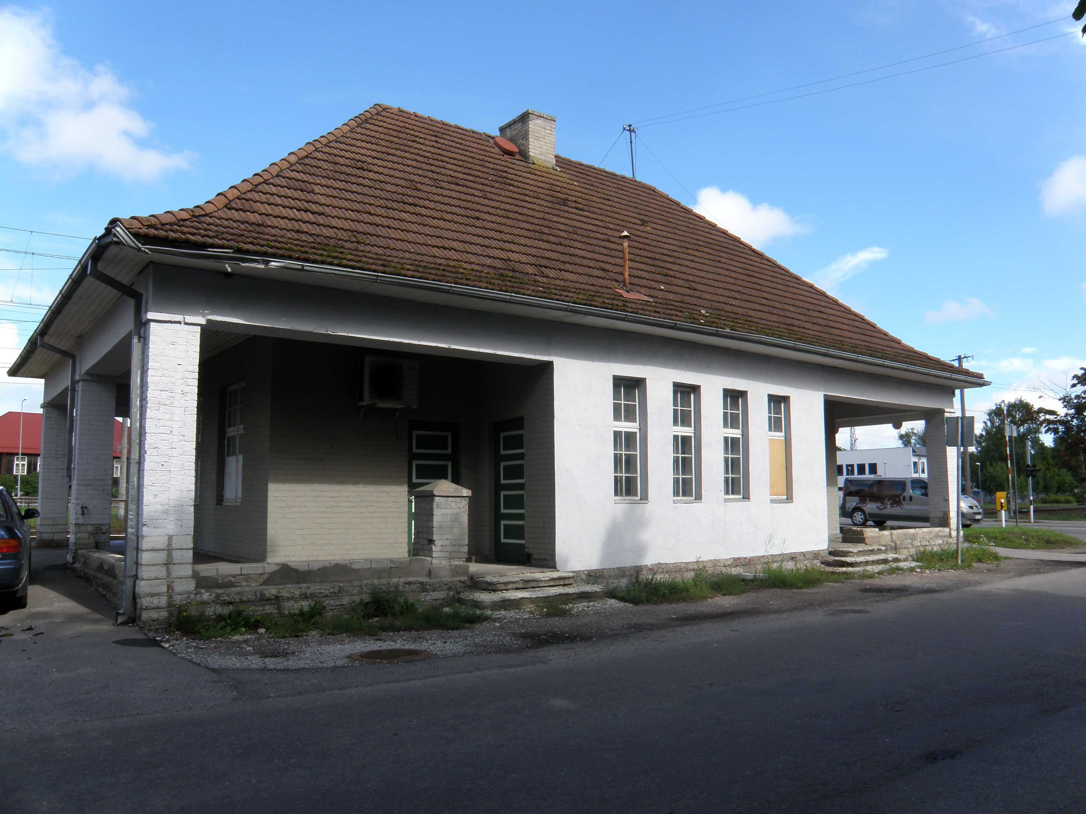 Hiiu jaamahoone